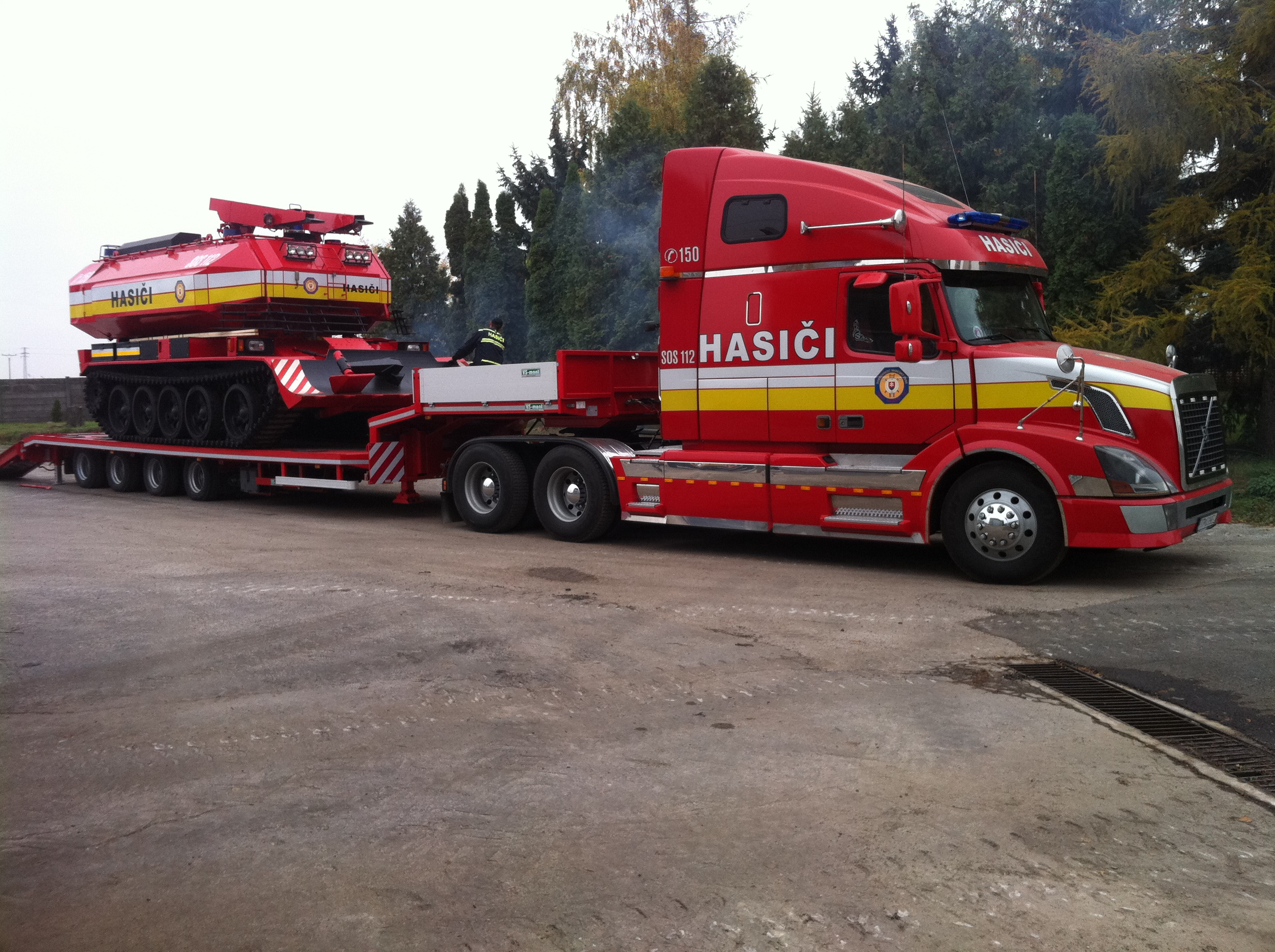 Ťahač Volvo VN s pásovým transportérom BVP dobrovoľného hasičského zboru Farárske Pole